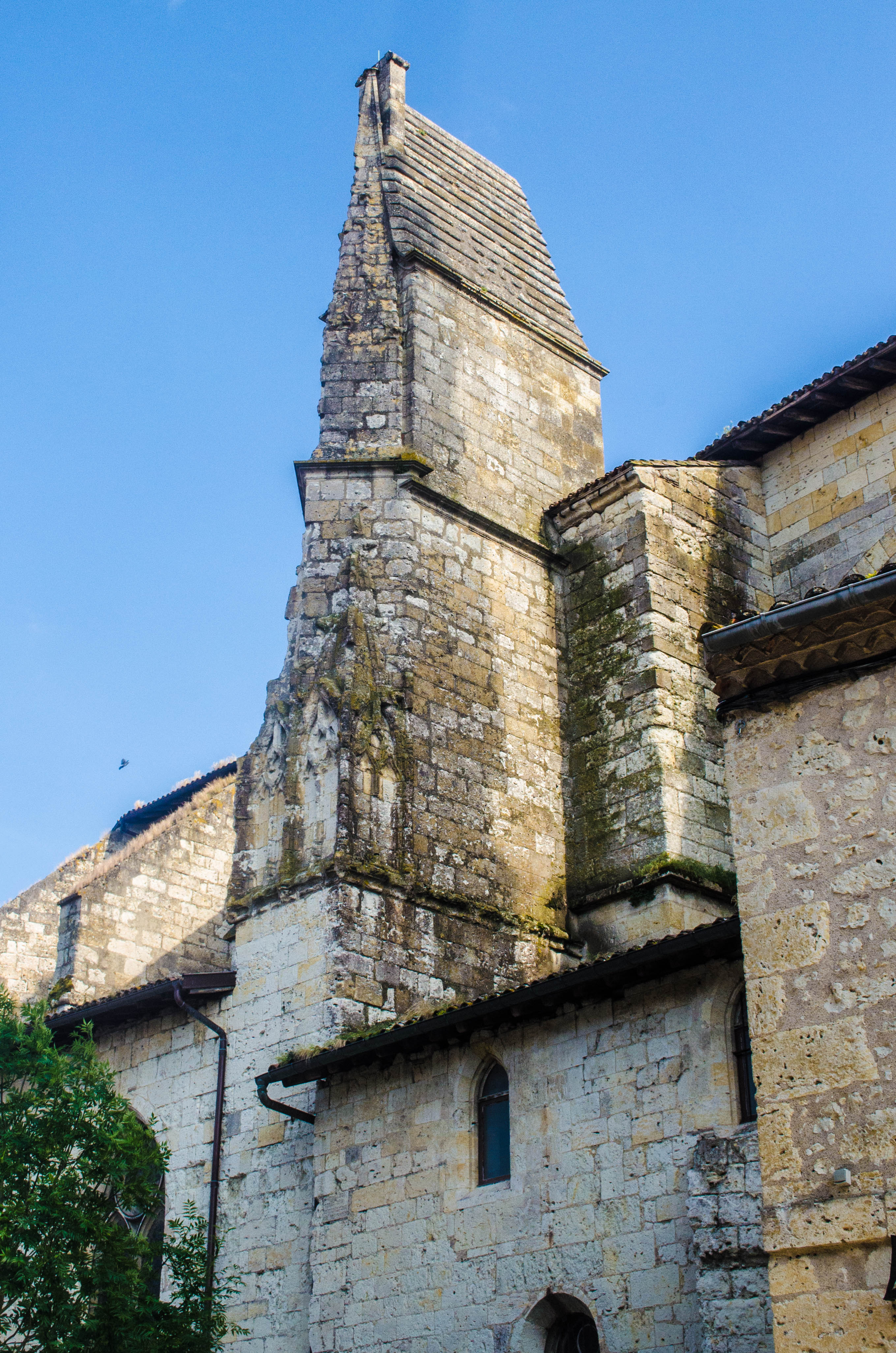 Lectoure, Gers, France. Cathédrale Saint-Gervais et Saint-Protais, contrefort Nord.